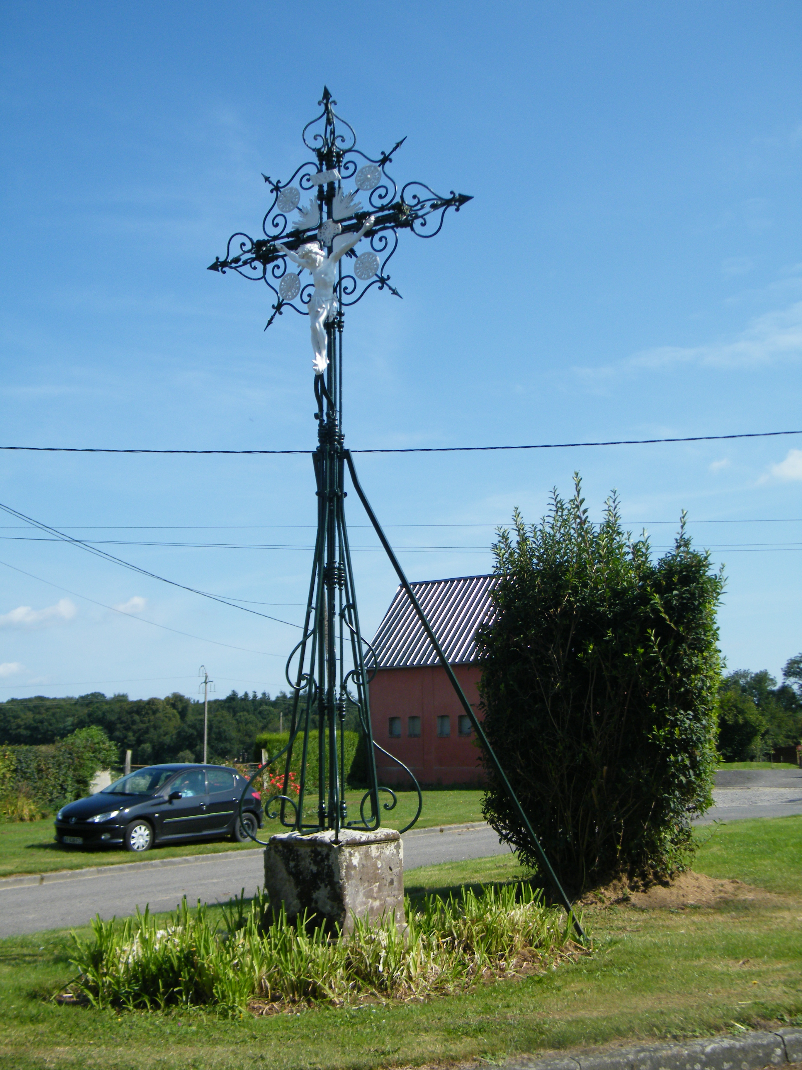 Calvaire emblématique.